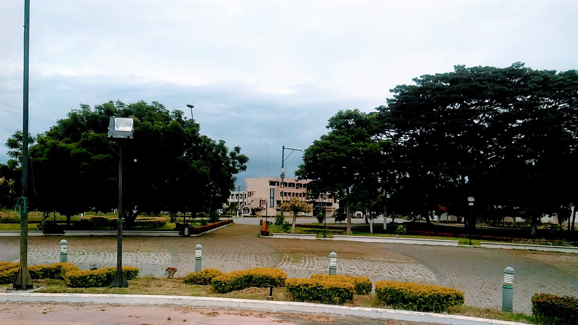 Facultad de la UTMACH